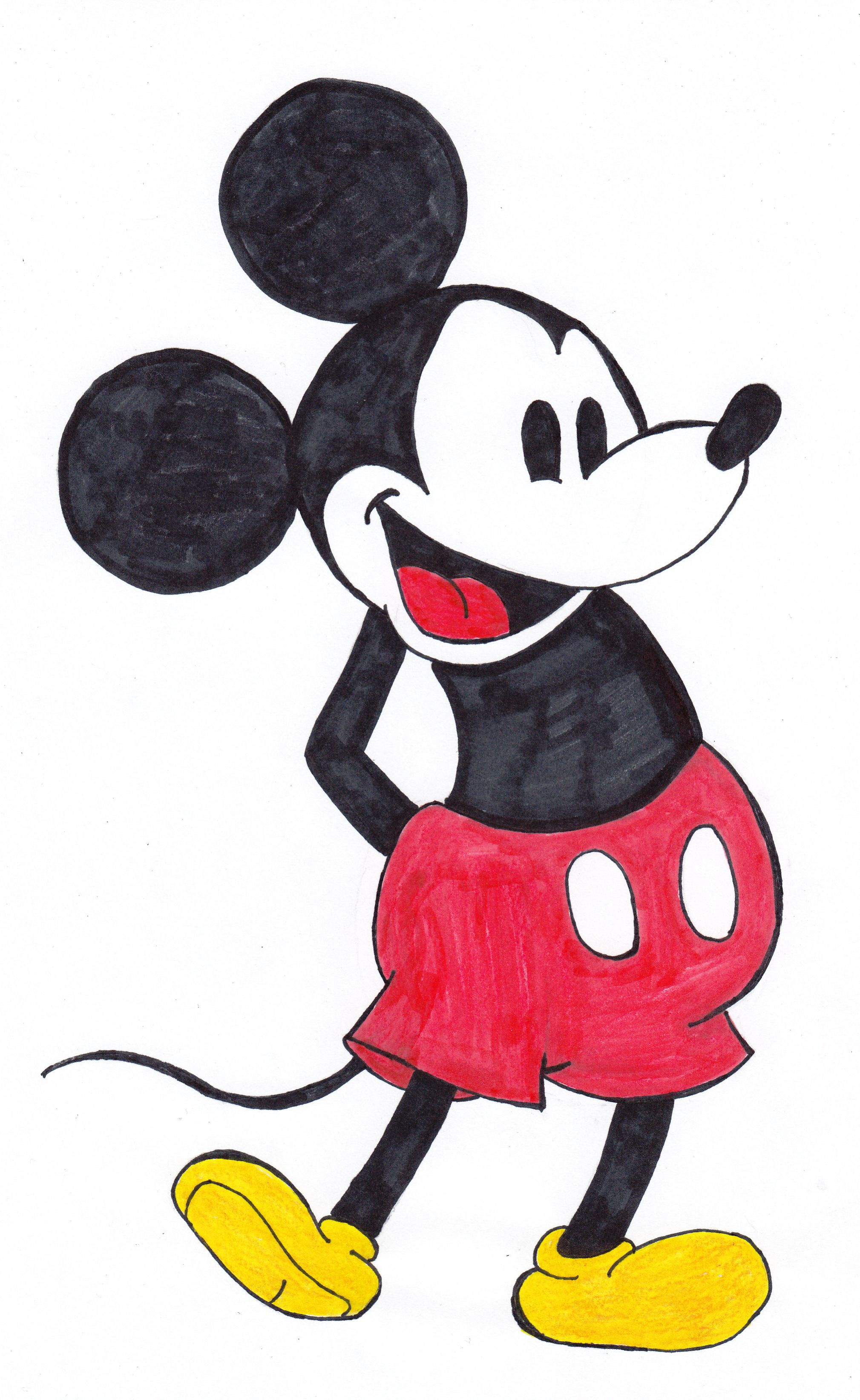 Mickey Mouse vznikol v roku 1928, toto je farebná kópia obrázku